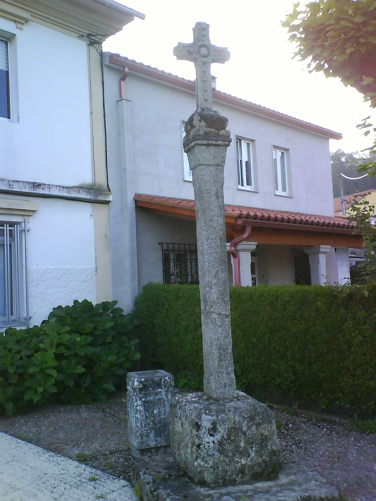 Cruceiro en Ledoño, concello de Culleredo.